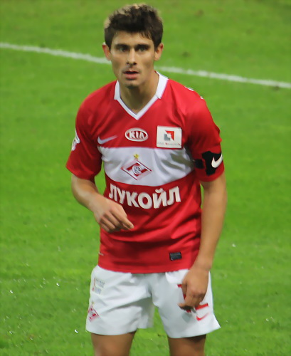 Alex Raphael Meschini